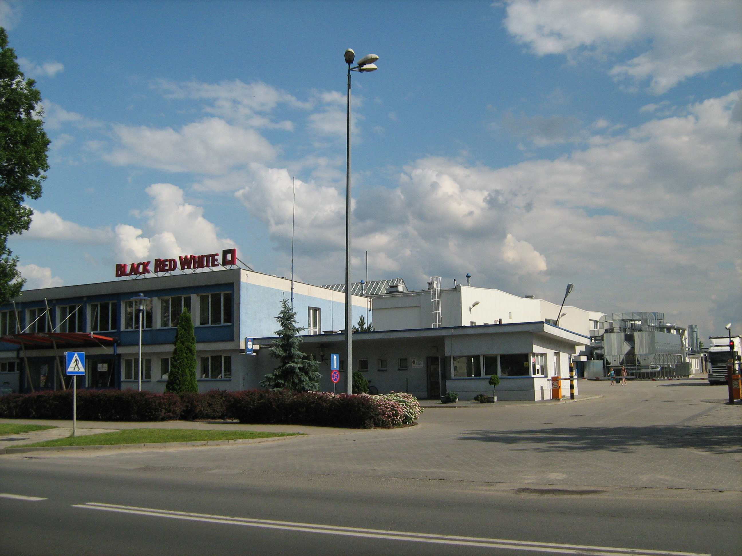 Biłgoraj - siedziba fabryki mebli "Black Red White".